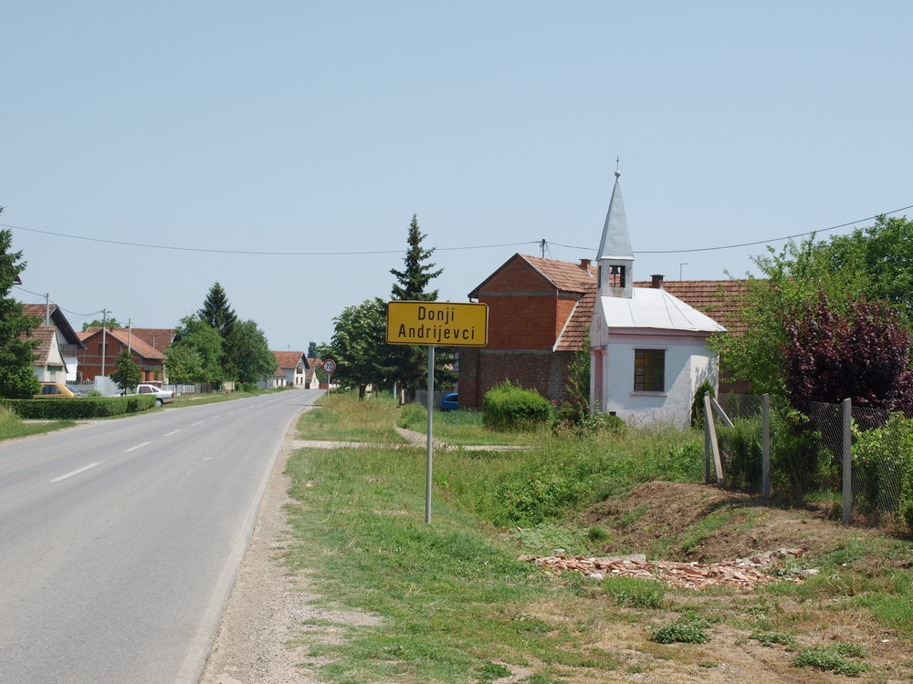 Ulaz u selo Donji Andrijevci, Brodsko-posavska županija.